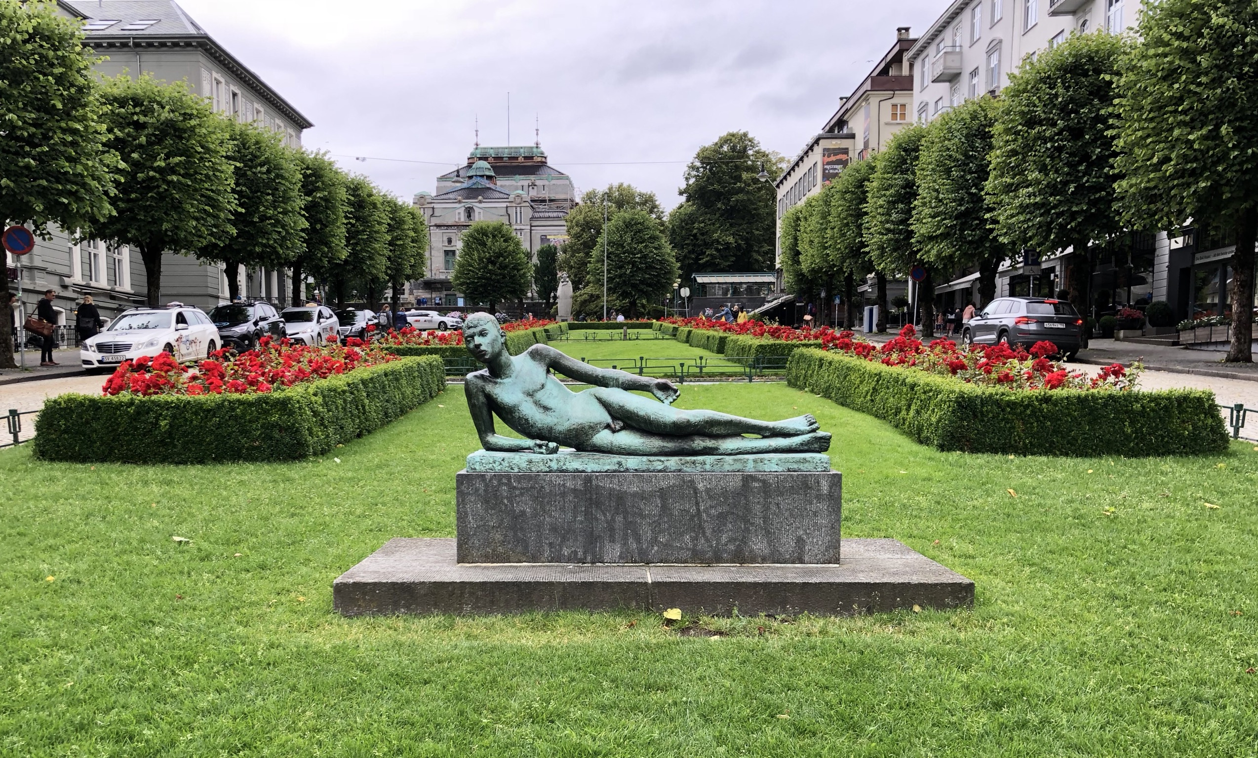 Parkanlage in Bergen